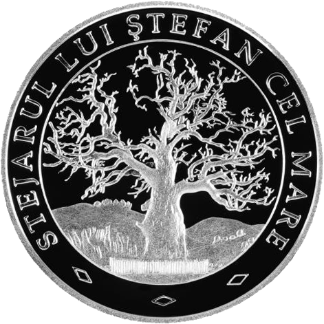 Реверс памятной монеты "Дуб Стефана III"